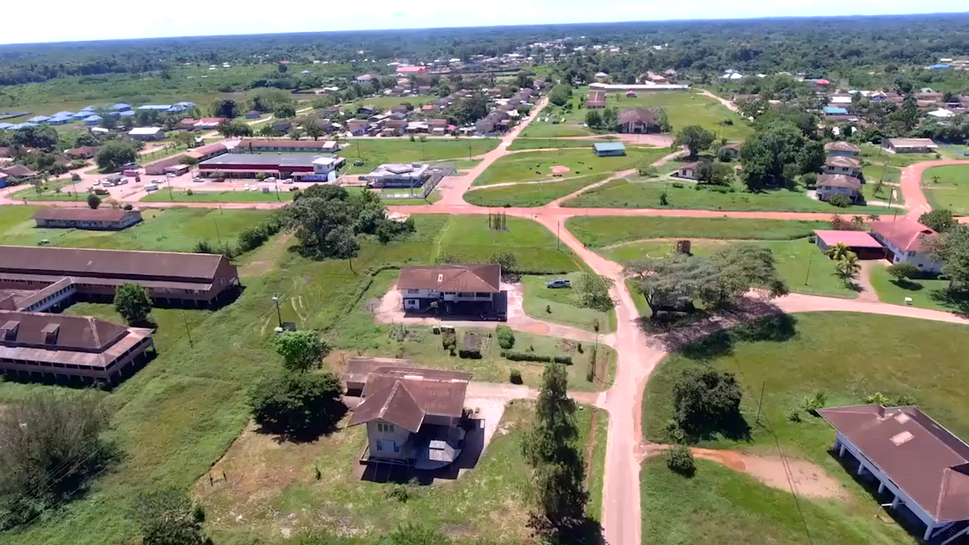 Stafdorp Moengo, voormalig terrein van Suralco